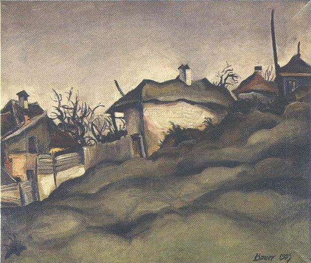 Periférie Košic